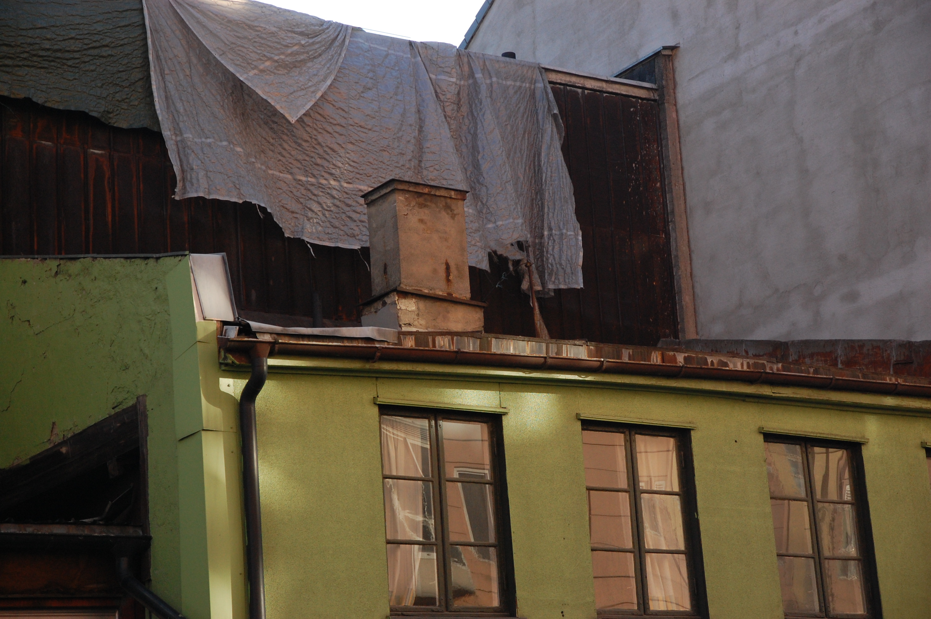 Tøyenbekken 12 på Grønland i Oslo